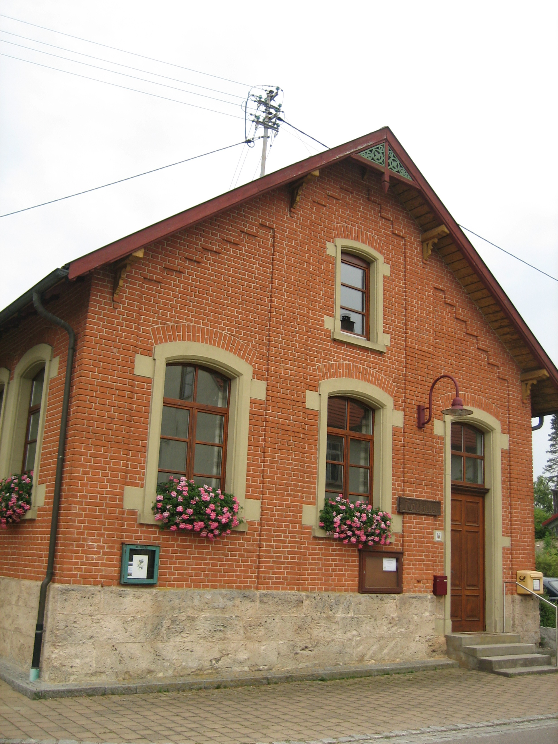 Rathaus Weilersteußlingen Gemeinde Allmendingen